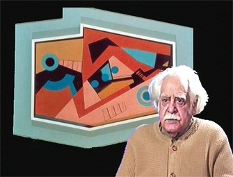 Portrait de Carmelo Arden-Quin